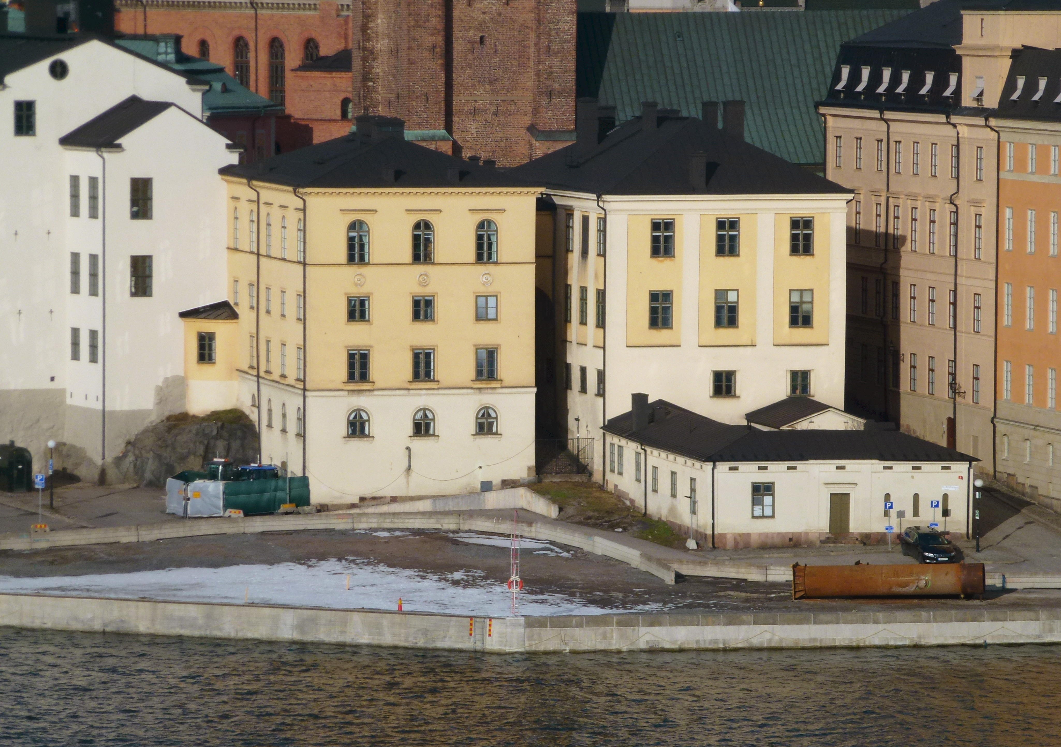 Västra och östra gymnasiehusen i mitten av bilden, framför Riddarholmskyrkan. Det östra gymnasiehuset är det högra.